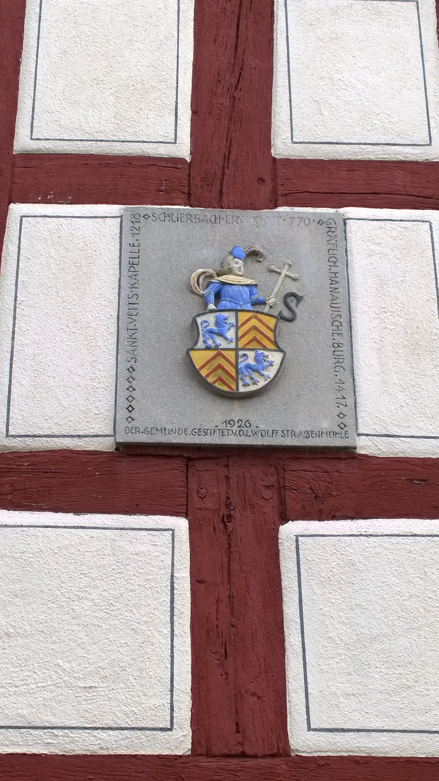 Das Wappen (verbaut 1926), dargestellt am Rathaus des Schaafheimer Ortsteiles Schlierbach im nördlichen Odenwald